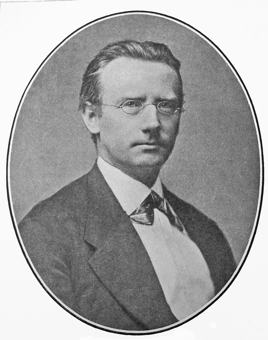 Peter Arnold Heise (11. februar 1830 - 12. september 1879) var dansk romantisk komponist. Han er mest kendt for at have skrevet musik til nogle kendte og populære sange fra Højskolesangbogen.